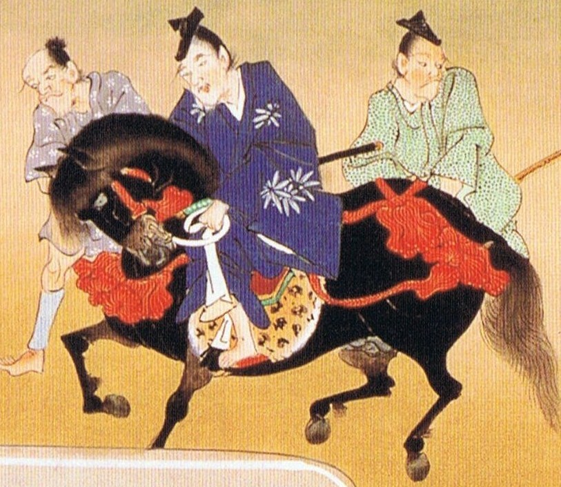 『平家物語絵巻』「源氏揃えの事」以仁王の令旨を諸国の源氏に伝え歩く源行家と従者。林原美術館所蔵